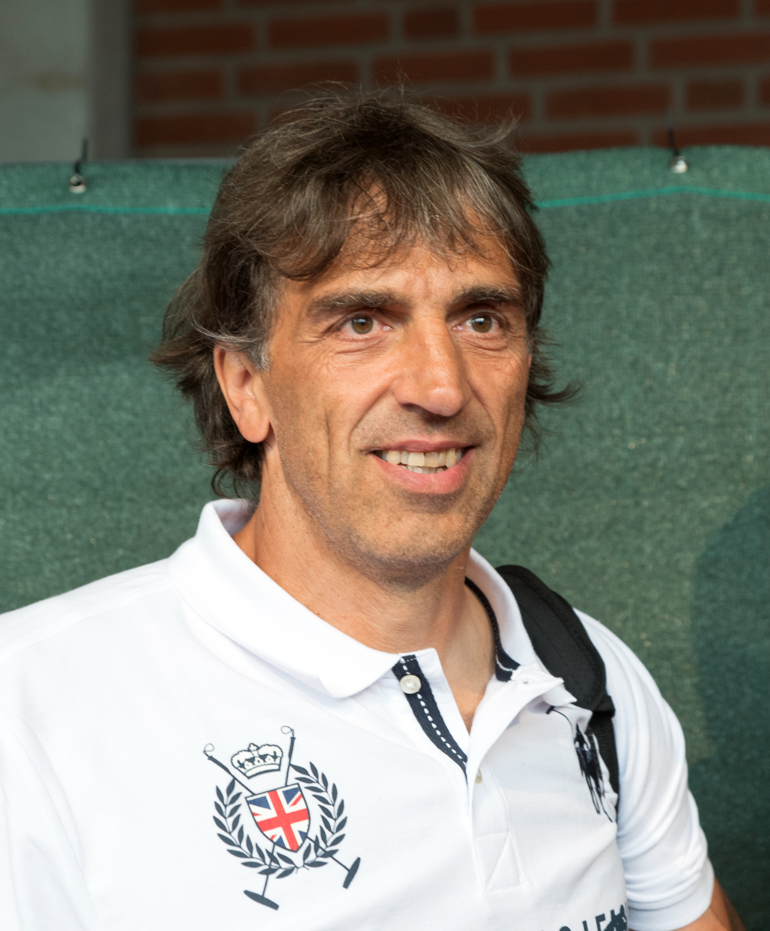 Claus Reitmaier beim Tag der Legenden 2016 in Hamburg